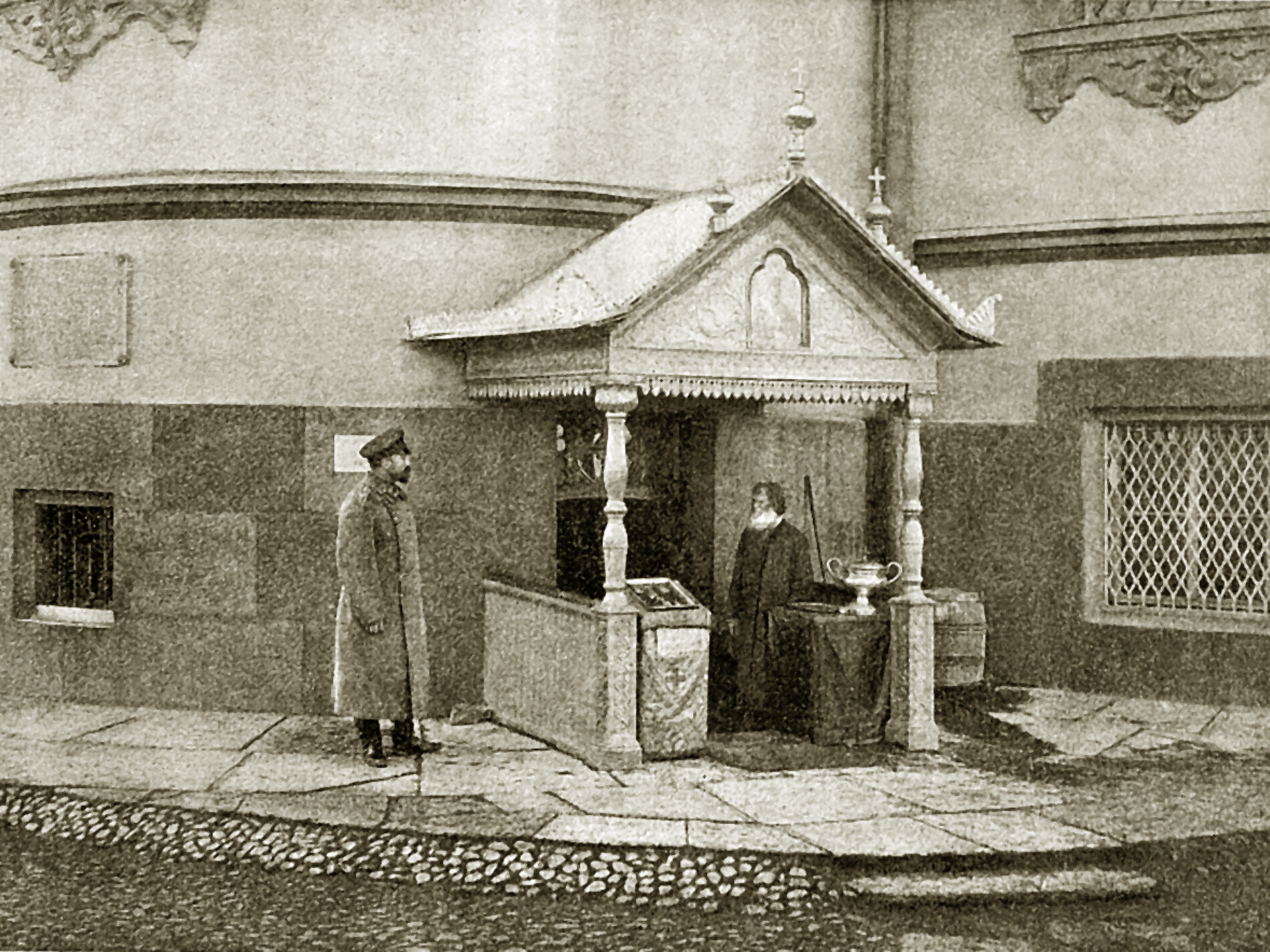 Вход в Никольскую часовню церкви лейб-гвардии Егерского полка св. великомученика Мирония, который мог служить и входом в склеп